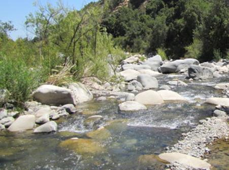 Río Clarillo en verano del 2010